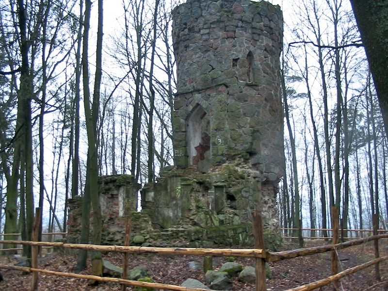 Bismarckturm in Drengfurth/Opr. (heute Srokowo)